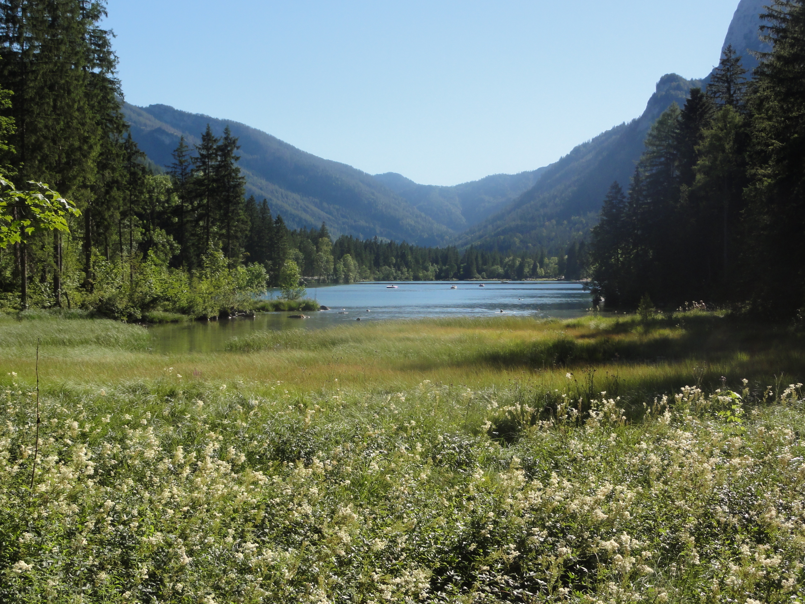 Germany, Bayern, Landkreis Berchtesgadener Land, Gemeinde Ramsau, Hintersee